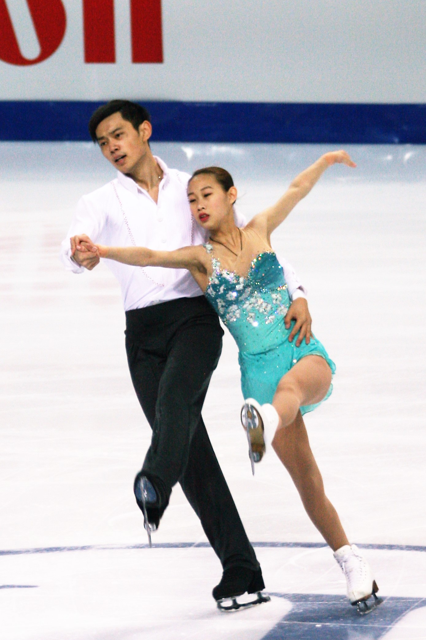 Пэн Чэн / Цзинь Ян (КНР) на финале Гран-при по фигурному катанию 2016-2017